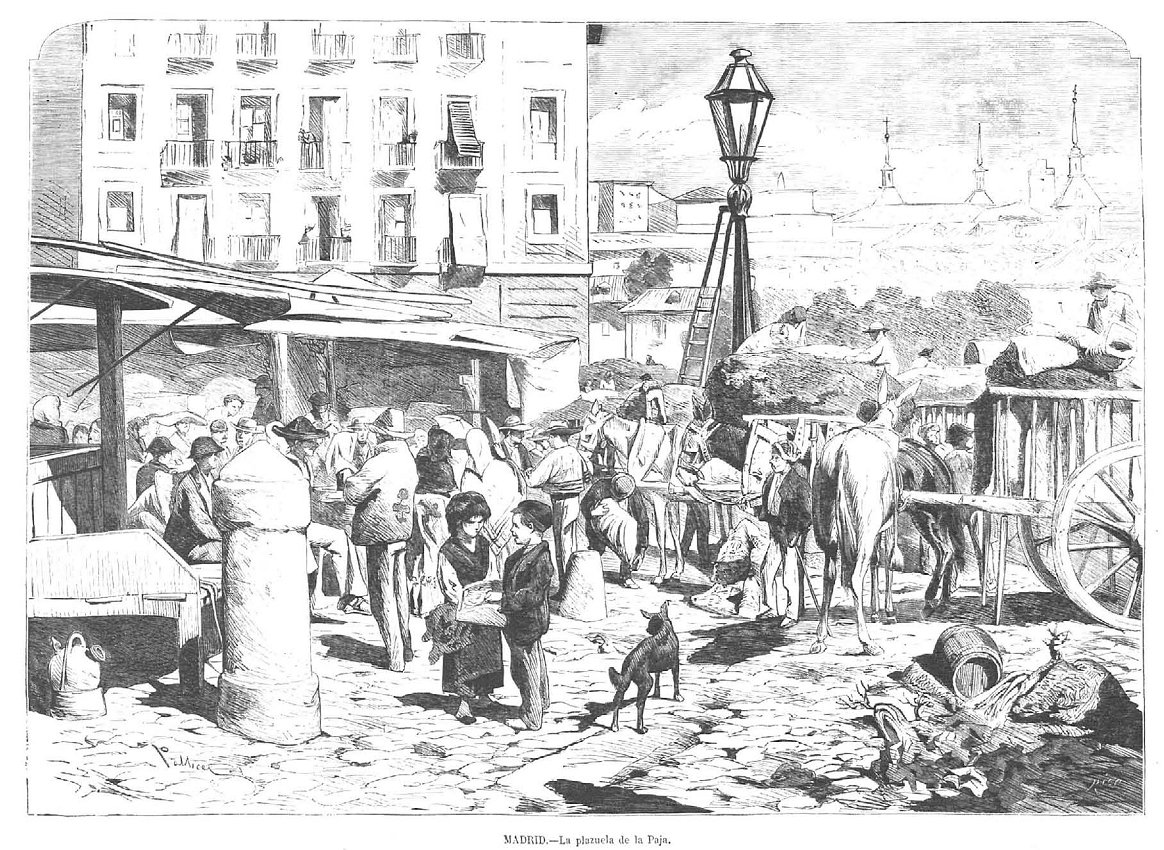 «Madrid, la plazuela de la Paja», en la revista española La Ilustración Española y Americana.